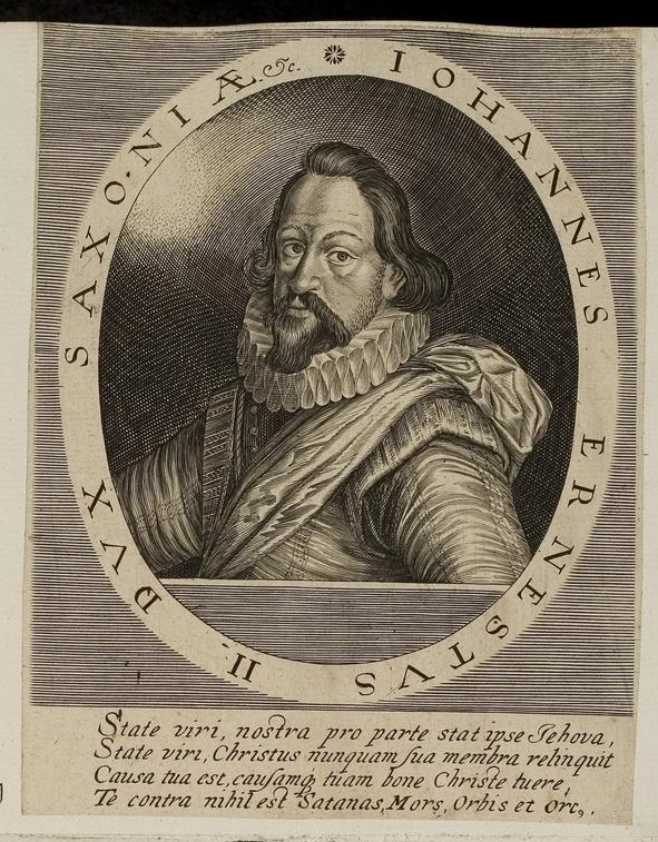 Grafik aus dem Klebeband Nr. 1 der Fürstlich Waldeckschen Hofbibliothek Arolsen Motiv: Herzog Johann Ernst II. von Sachsen-Weimar.